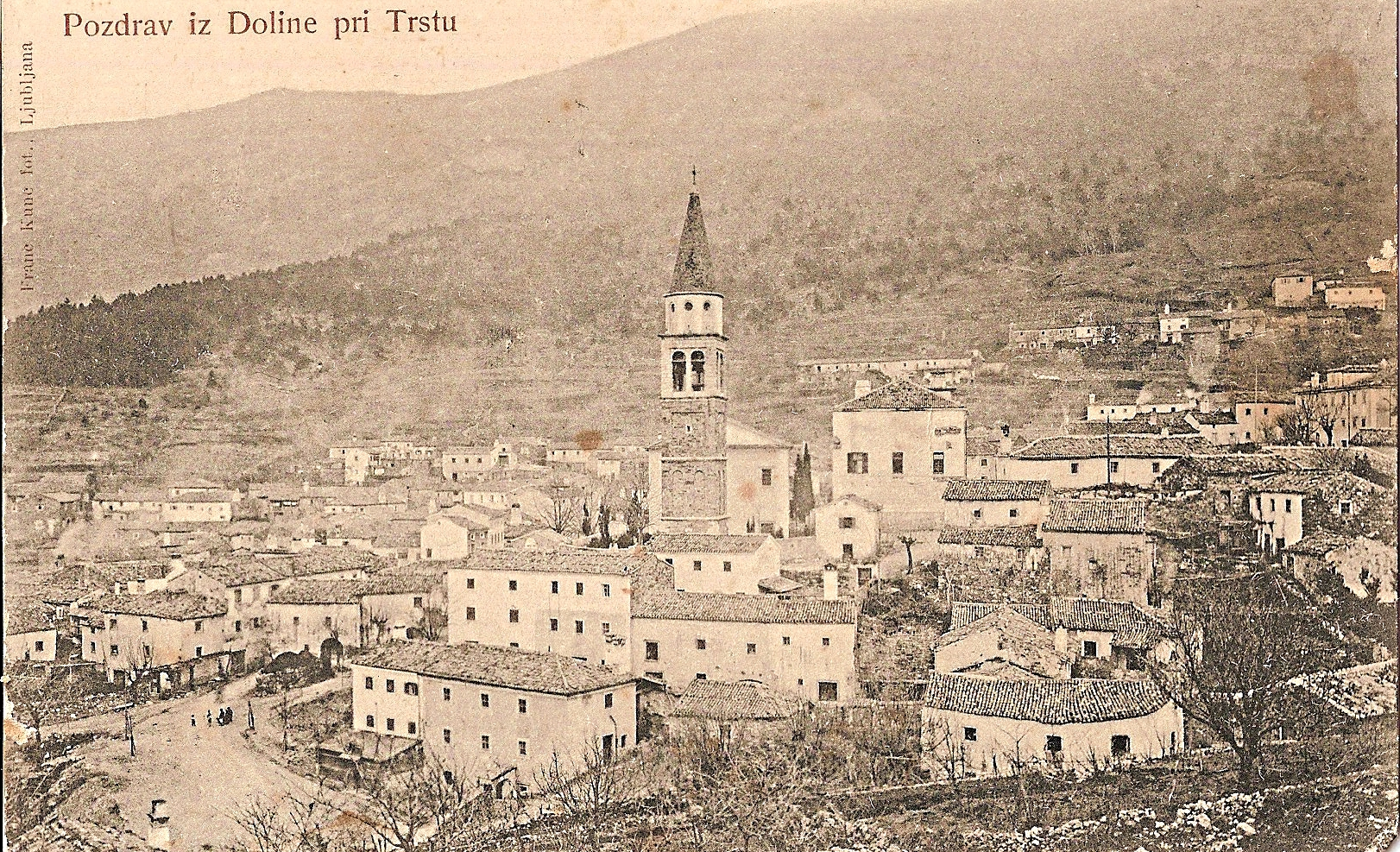 Razglednica Doline pri Trstu.